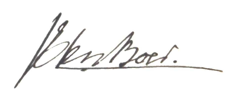 Jan den Boer signature.